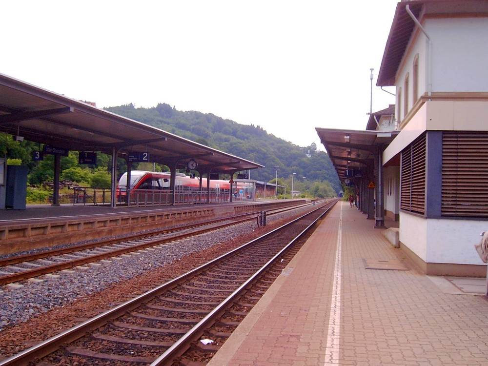 Idar-Oberstein Bahnsteige